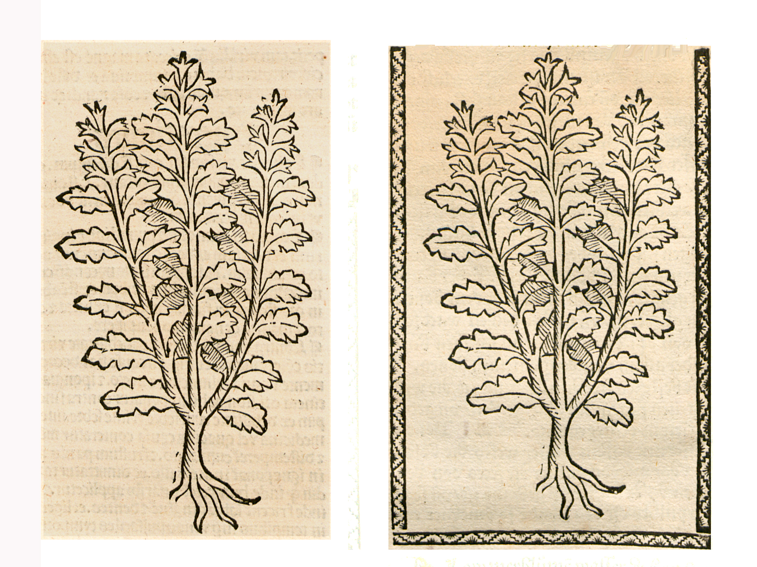 Abbildung von: Blaue Maiblume (unbestimmt)